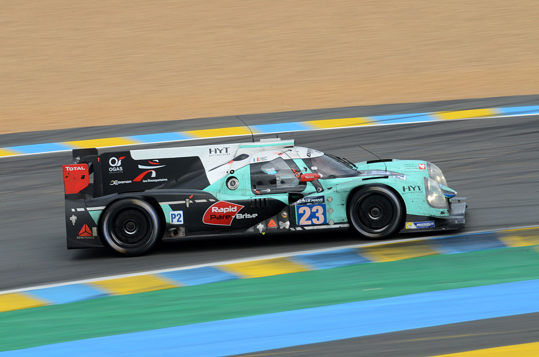 La Ligier JS P2 - Nissan de l'écurie Pans Barthez Compétition pilotée par Fabien Barthez, Timothé Buret et Paul-Loup Chatin lors des 24 Heures du Mans 2016